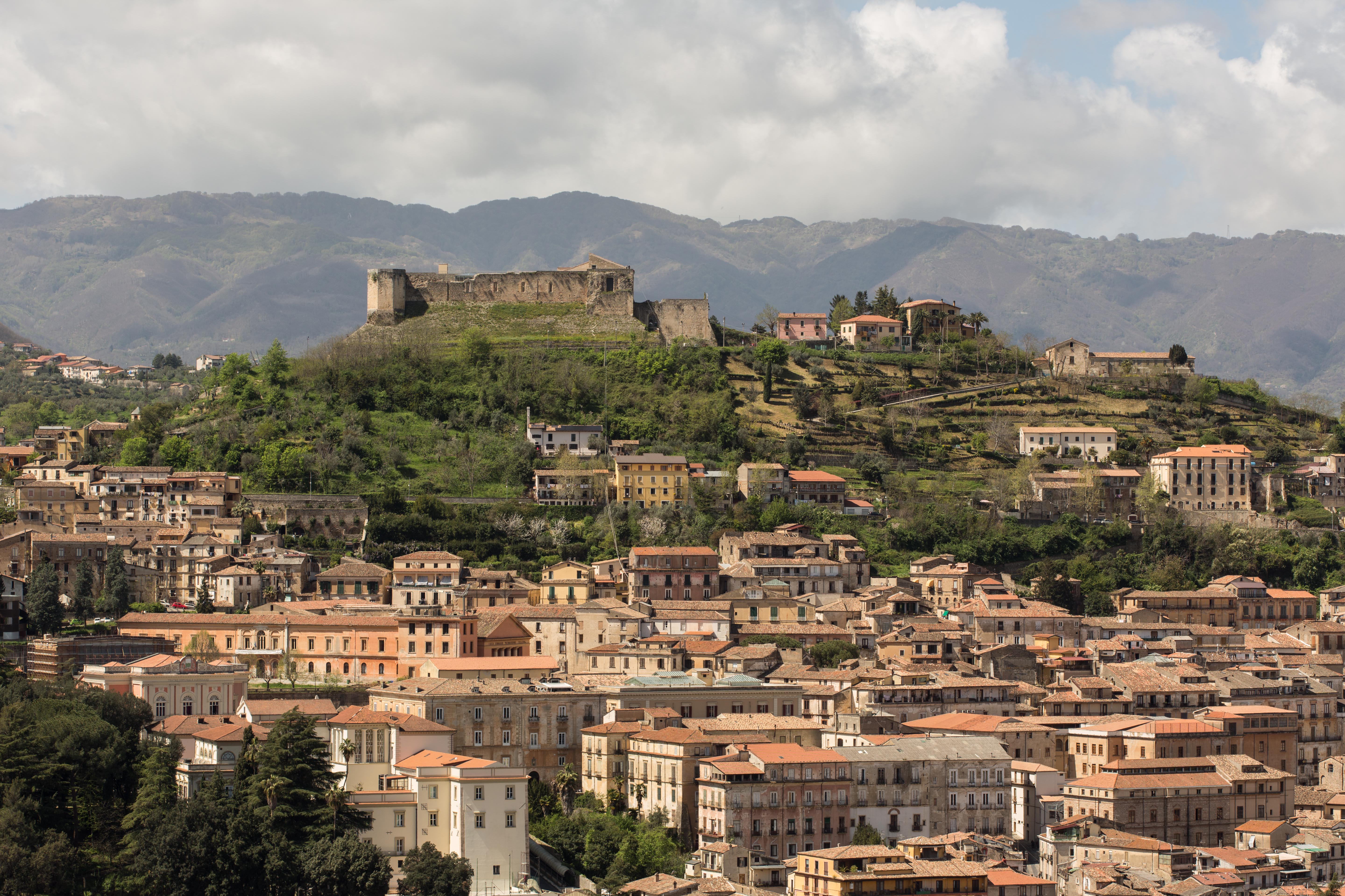 Castello Svevo This is a photo of a monument which is part of cultural heritage of Italy.